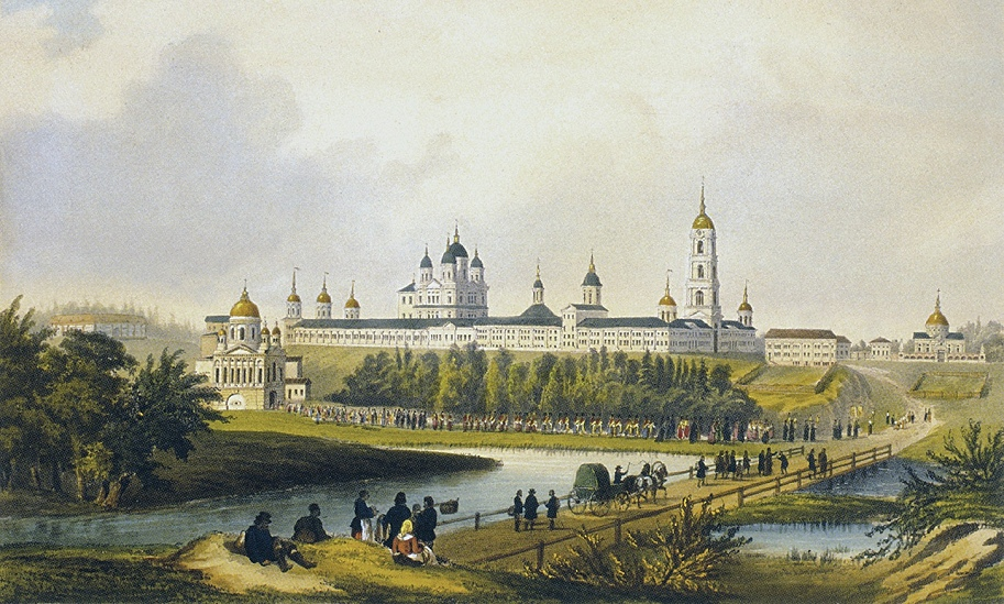 Вид Саровской пустыни. Литография мастерской Ж. Лемерсье. 1860-е гг.